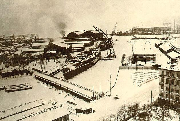 Линкоры "Гангут" и "Полтава" в период достройки.